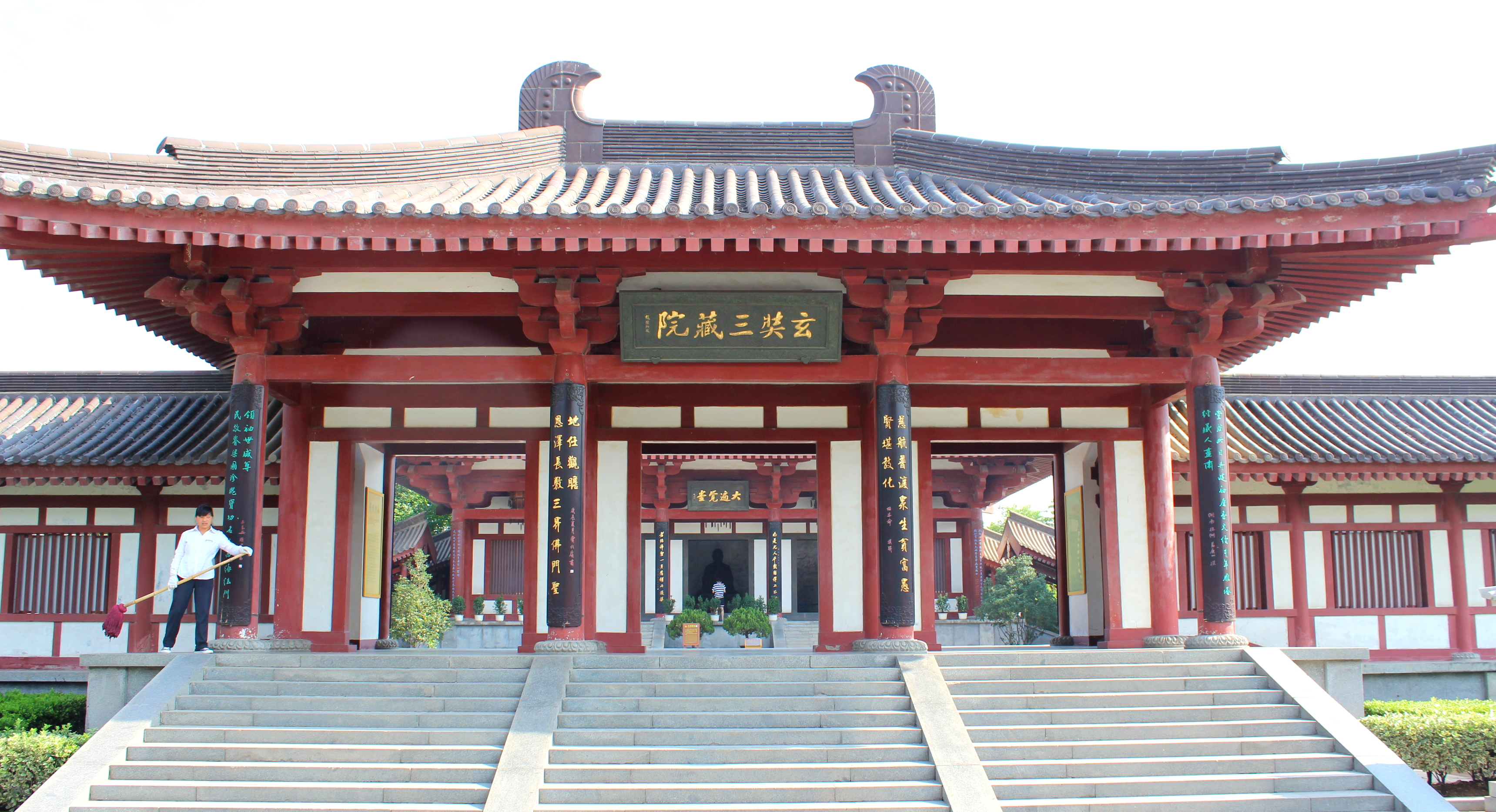 Daci'en Temple, Xi'an, China